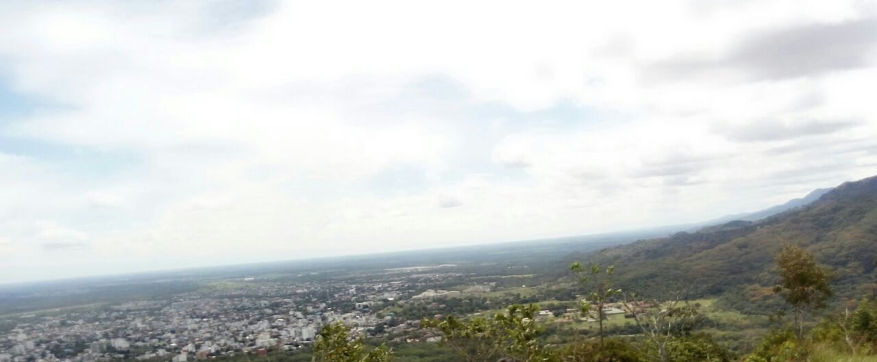 desde el cerro se puede apreciar la ciudad en su totalidad